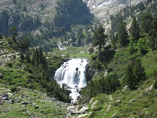 El Forau de Aigualluts (Benasque, Huesca, Aragón, España) Esta imagen ha sido tomada personalmente por Usuario:Avh